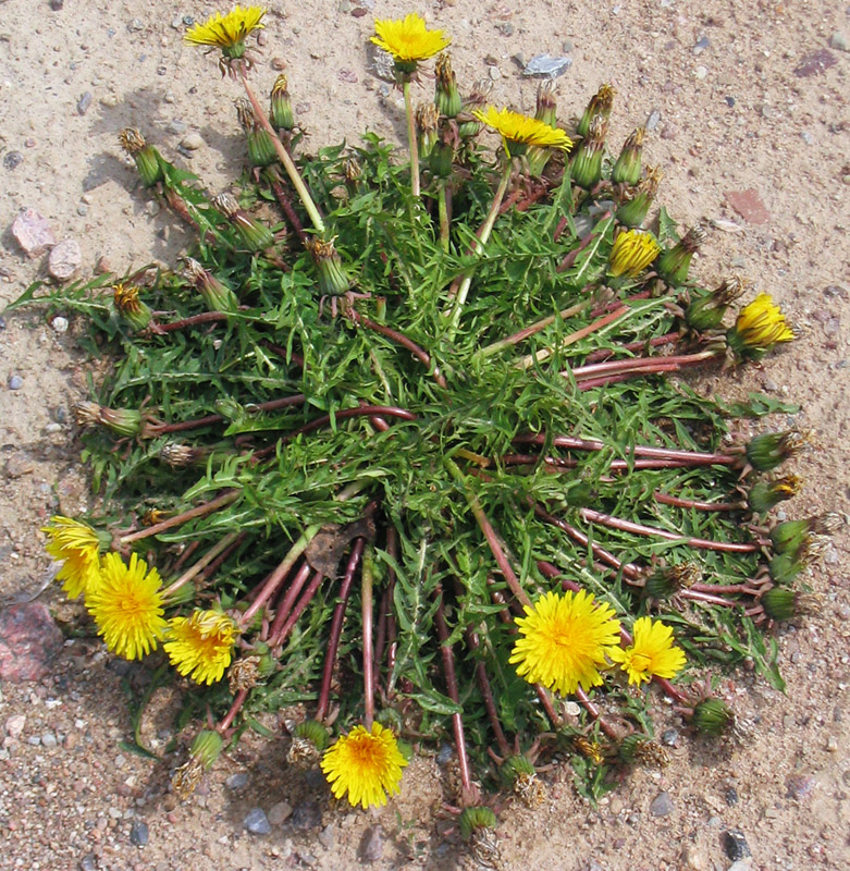 Beschreibung: Gewöhnlicher Löwenzahn (Taraxacum officinale agg.) Fotograf: Darkone, 15. Mai 2005